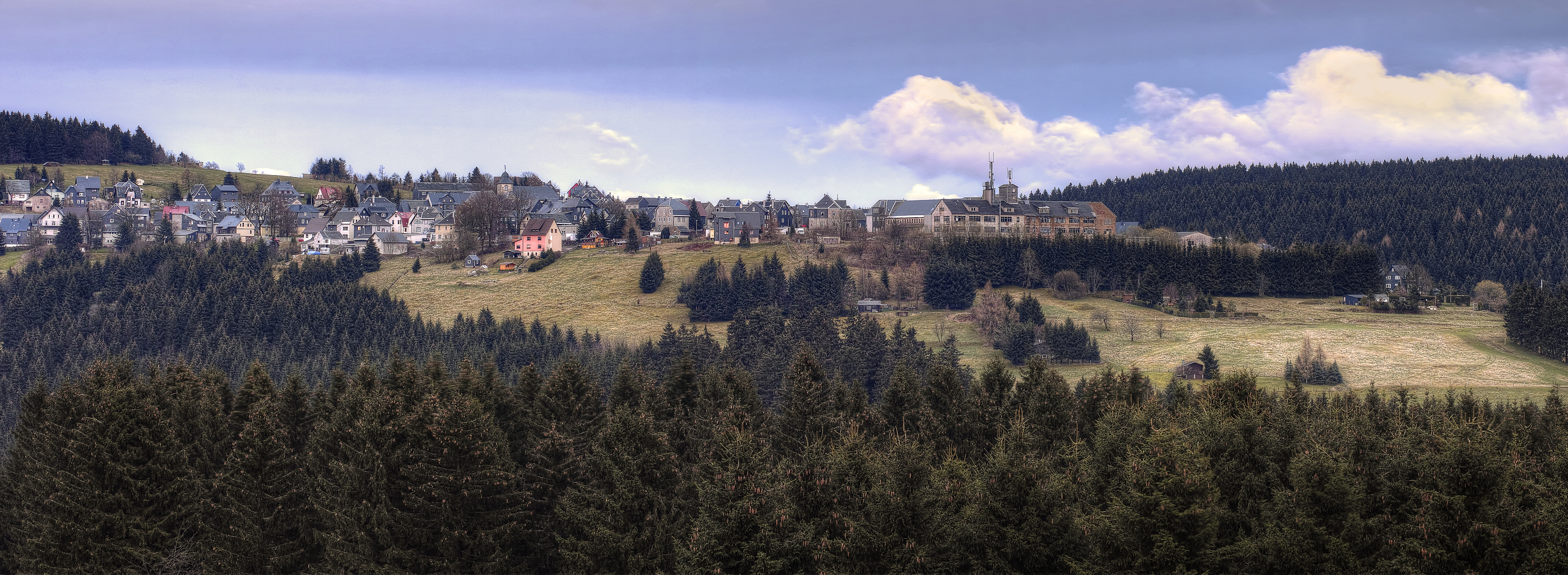 Steinheid von Siegmundsburg aus gesehen. Ersteller: Volker Siegel